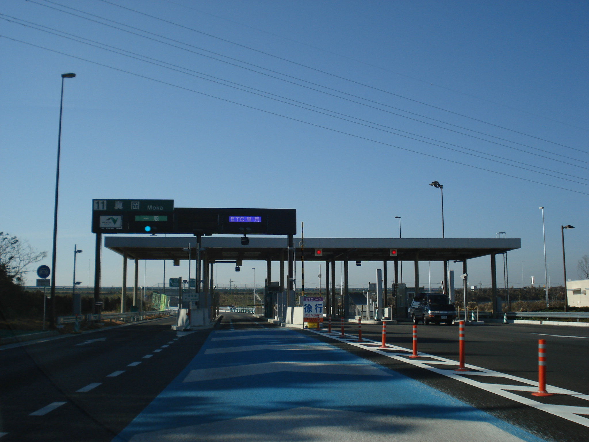 北関東自動車道 真岡インターチェンジ 料金所 栃木県真岡市長田